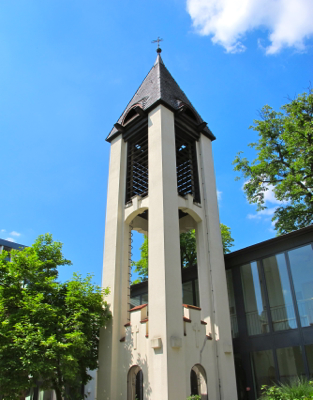 Schwedische Victoria-Gemeinde, Landhausstrasse, Berlin-Wilmersdorf, Glockenturm gestaltet von dem schwedischen Architekten Alfred Grenander